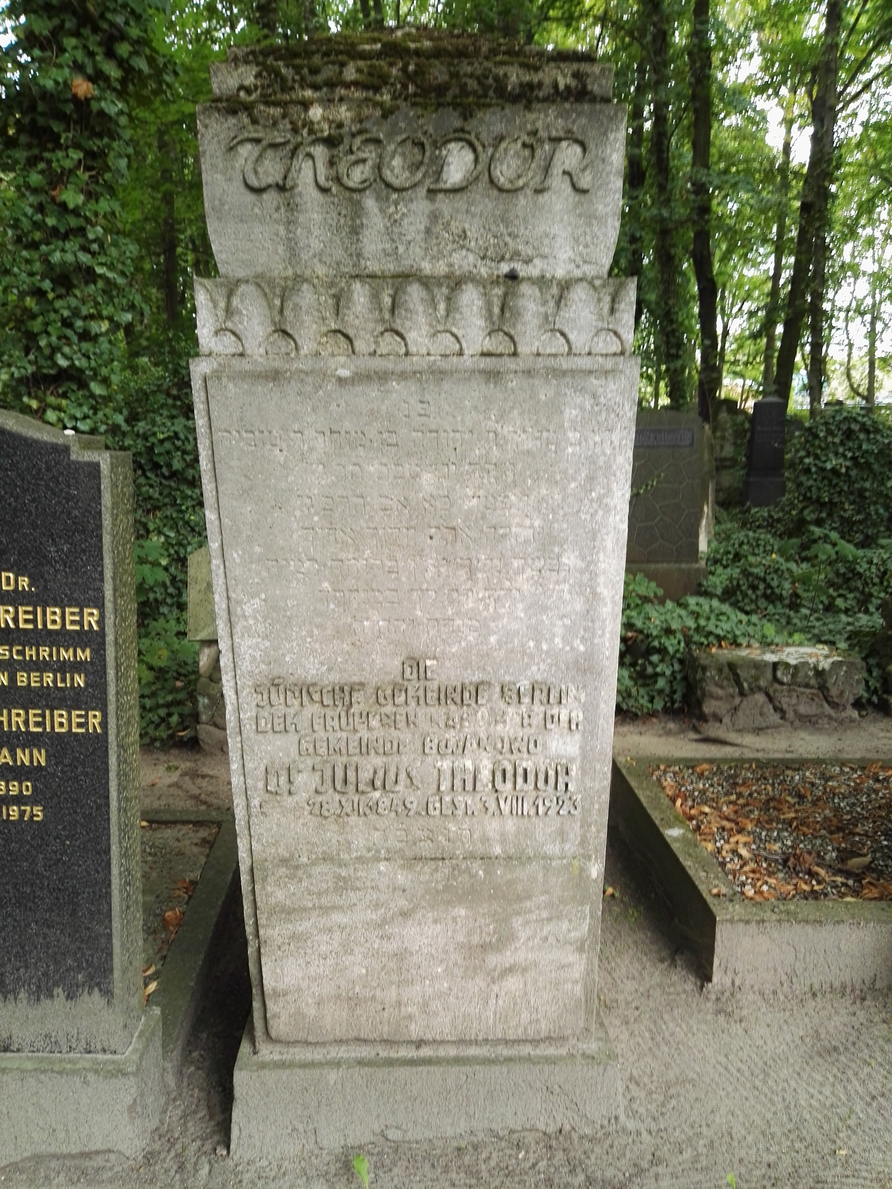 Grab von Dr. Julius Theodor auf dem Jüdischen Friedhof Berlin-Weißensee